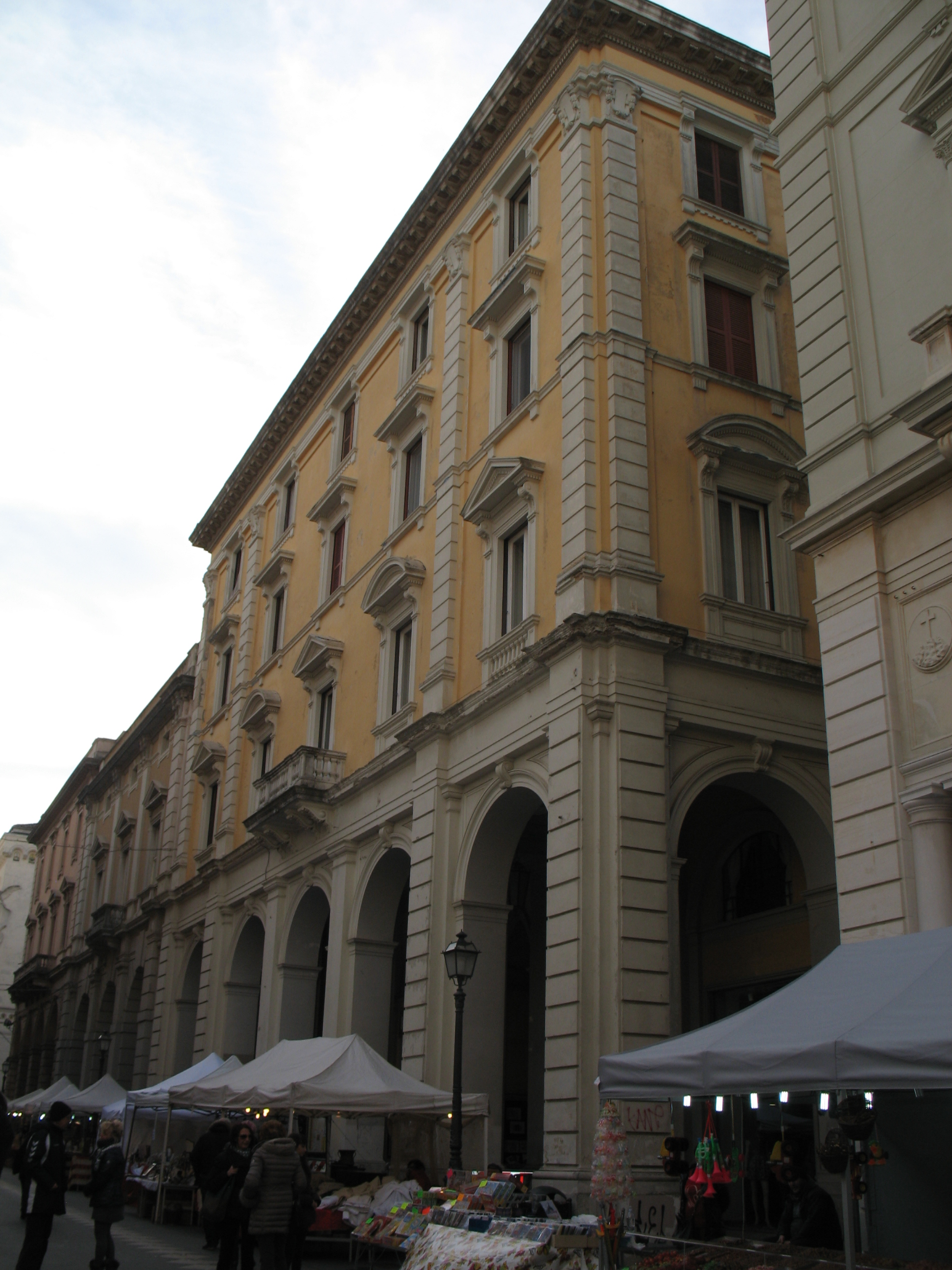 Chieti, Corso Marruccino: Palazzo De Felice.